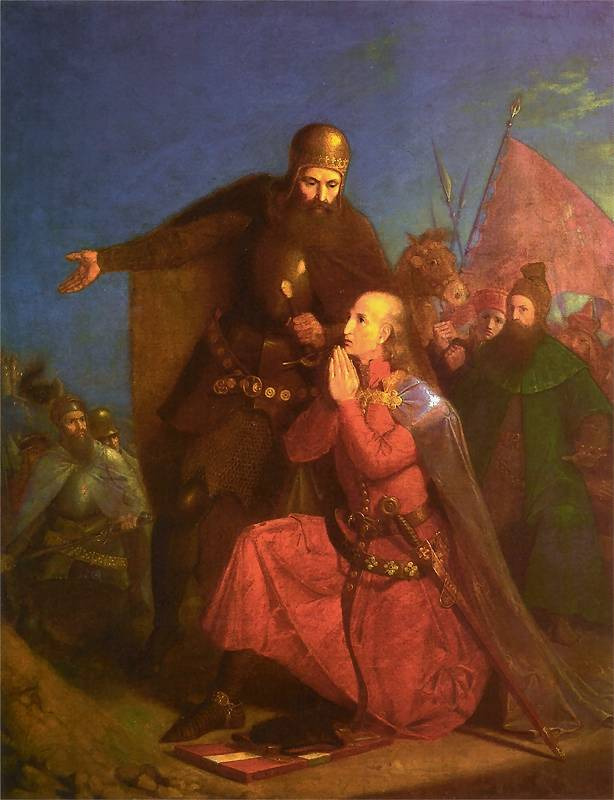 Władysław Jagiełło z Witoldem modlący się przed bitwą pod Grunwaldem